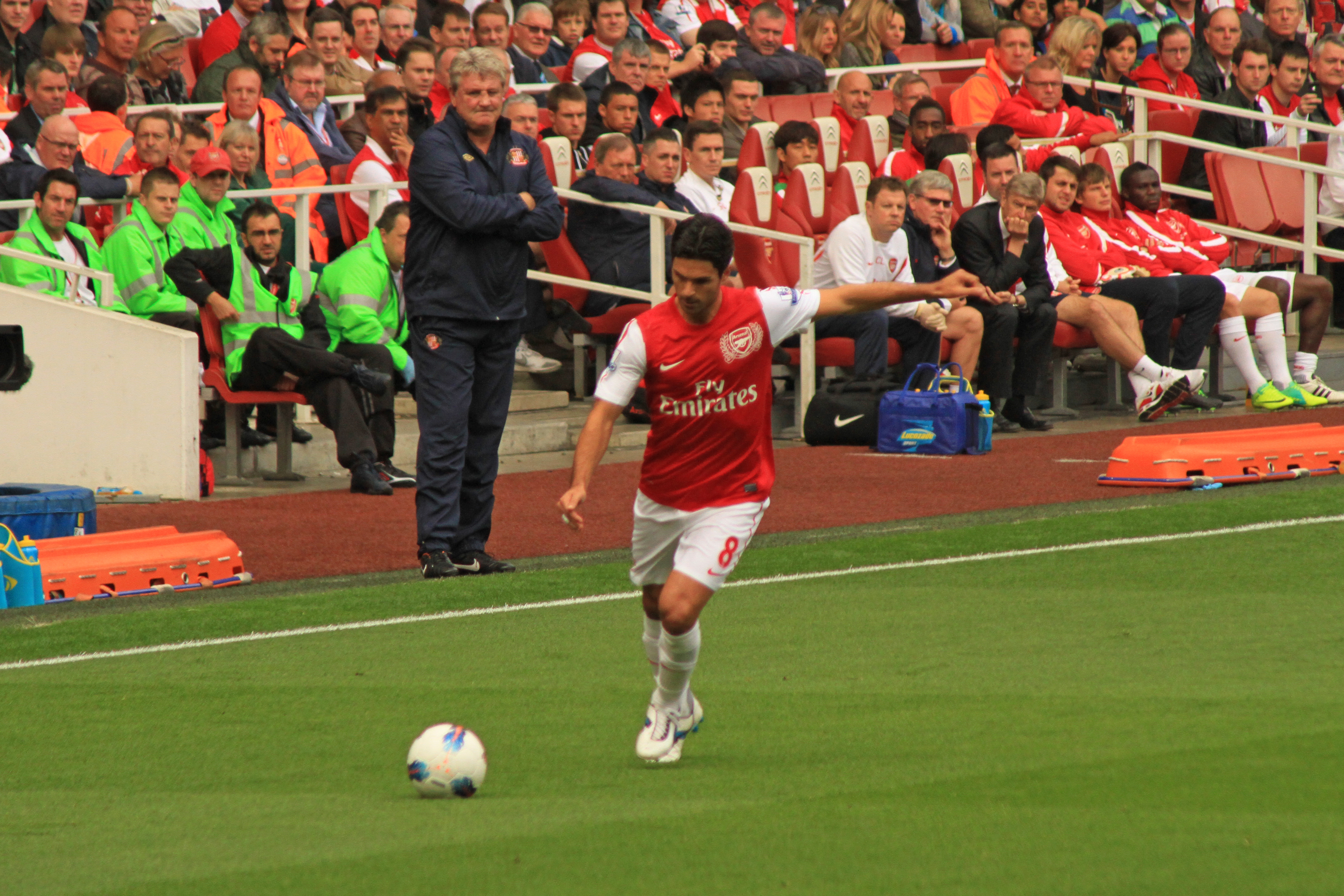 Mikel Arteta 2